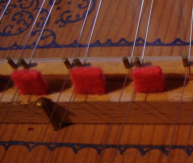 Clavecin : détail du «jeu de luth» (anglais : buff stop)